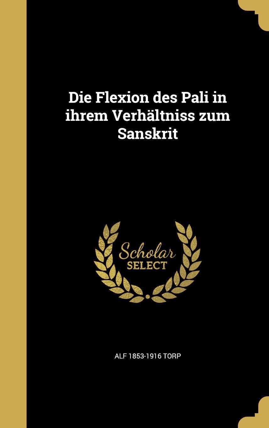 Alf Torp: Die Flexion des Pali in ihrem Verhältnis zum Sanskrit. Nachdruck des Werks von 1861, Wentworth 2016, ISBN 9781361853849.